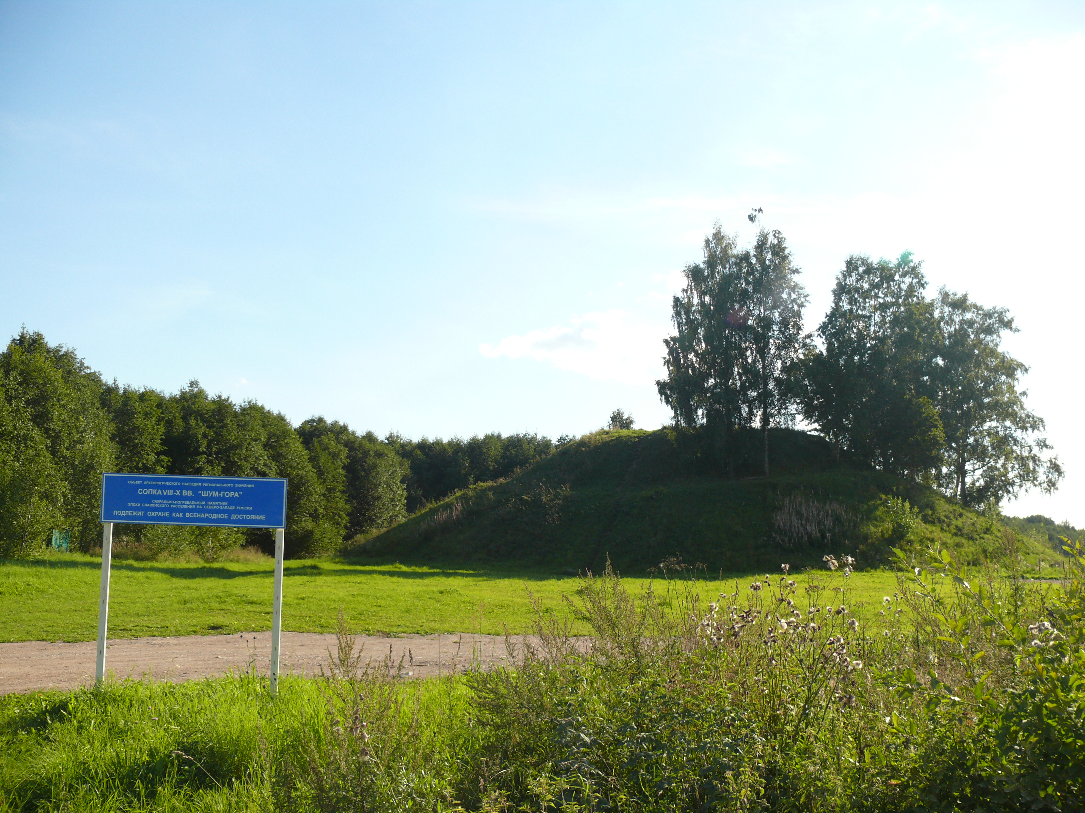 Шум-гора - славянский курган в Батецком районе Новгородской области